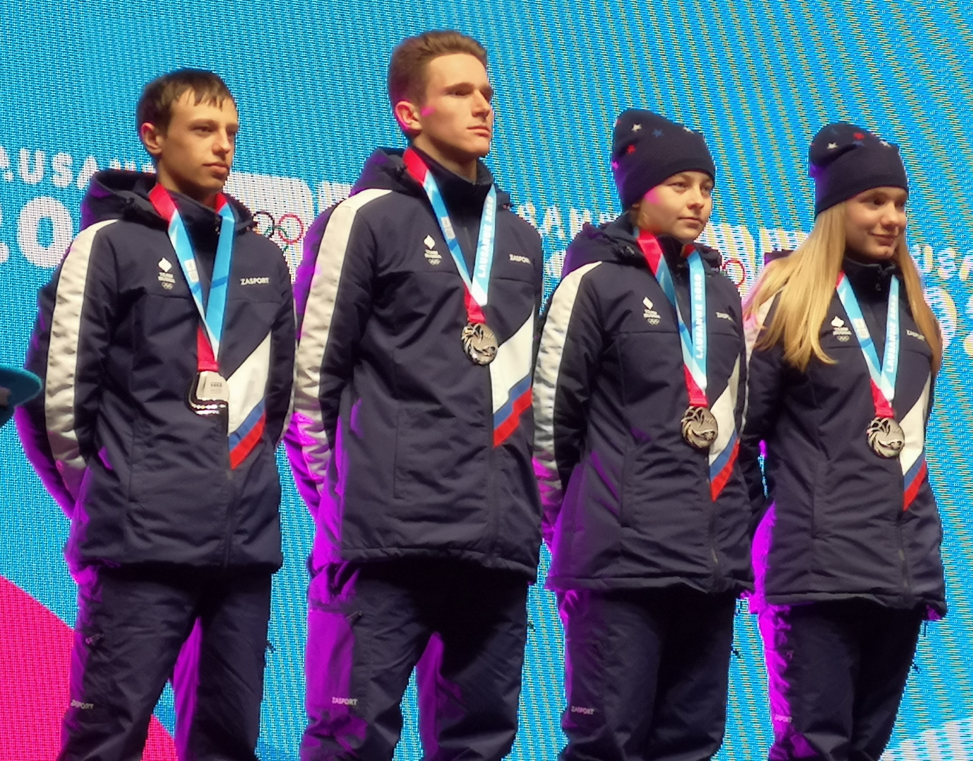 L'équipe russe de biathlon pendant la cérémonie de remise des médailles du relais.